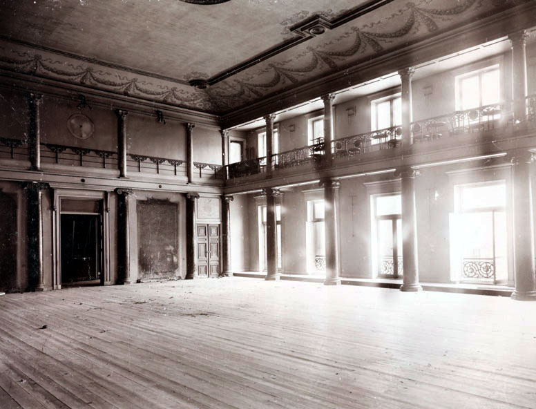 Stockholms stads handtverksförening, Brunkebergstorg 15, 1tr. Interiör mot nordost